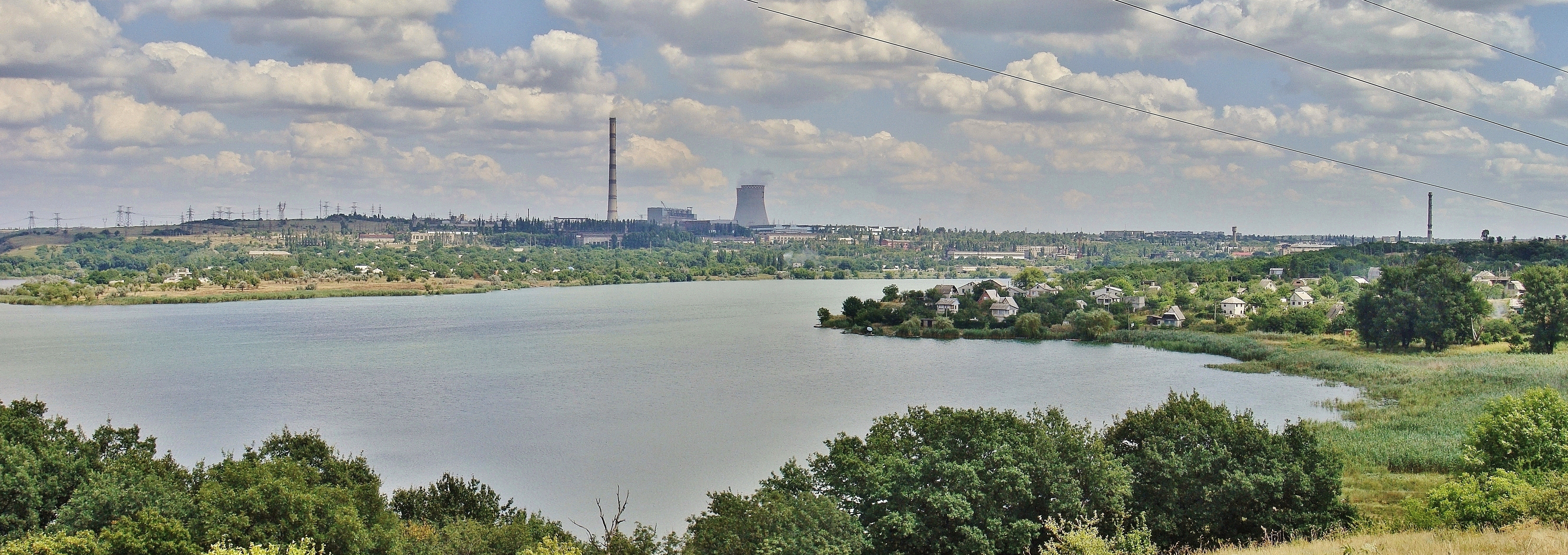 Зугрэс.